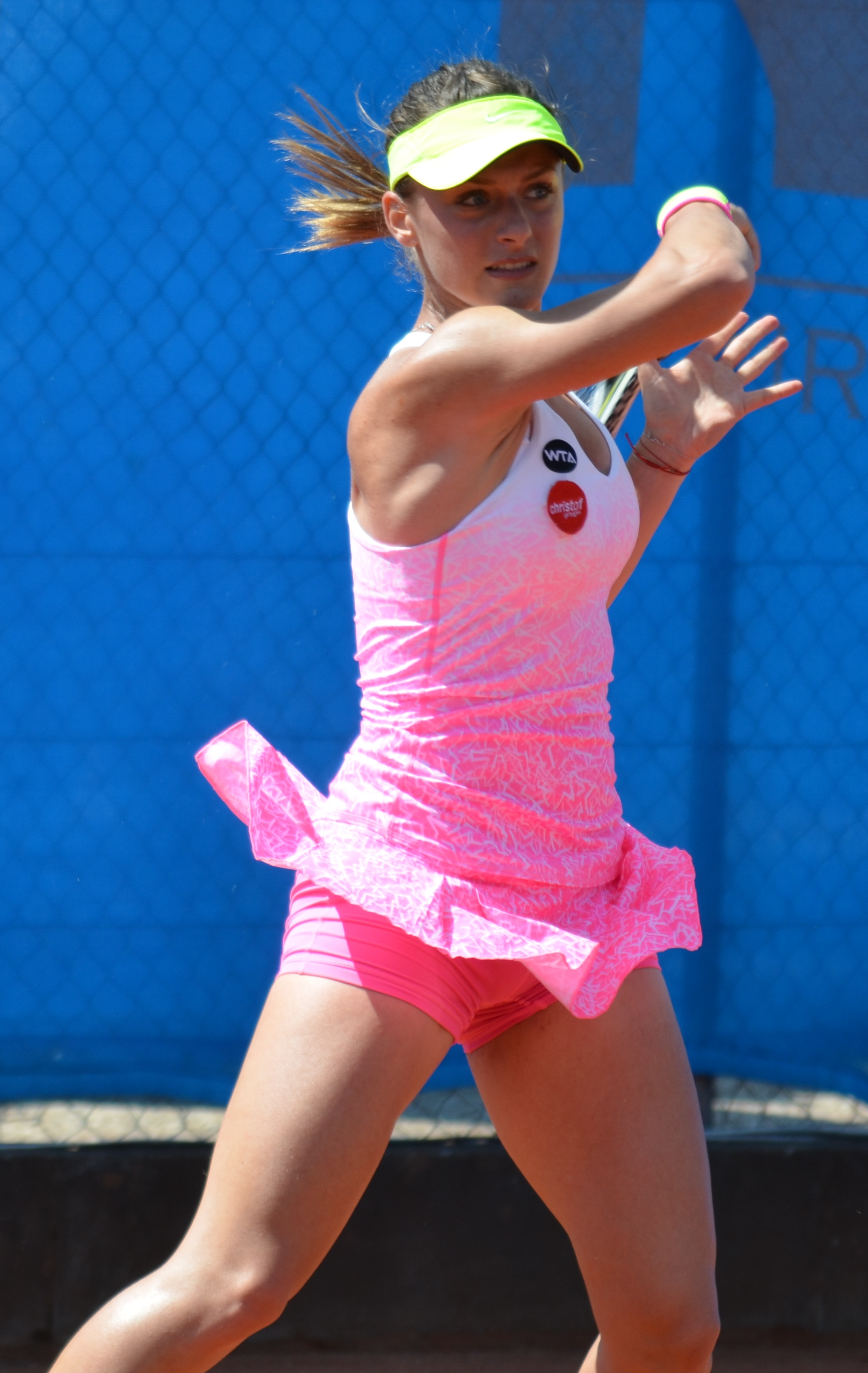 Ana Bogdan in der Qualifikationsbegegnung des Nürnberger Versicherungscup 2015 gegen Rebecca Peterson am 16.05.2015